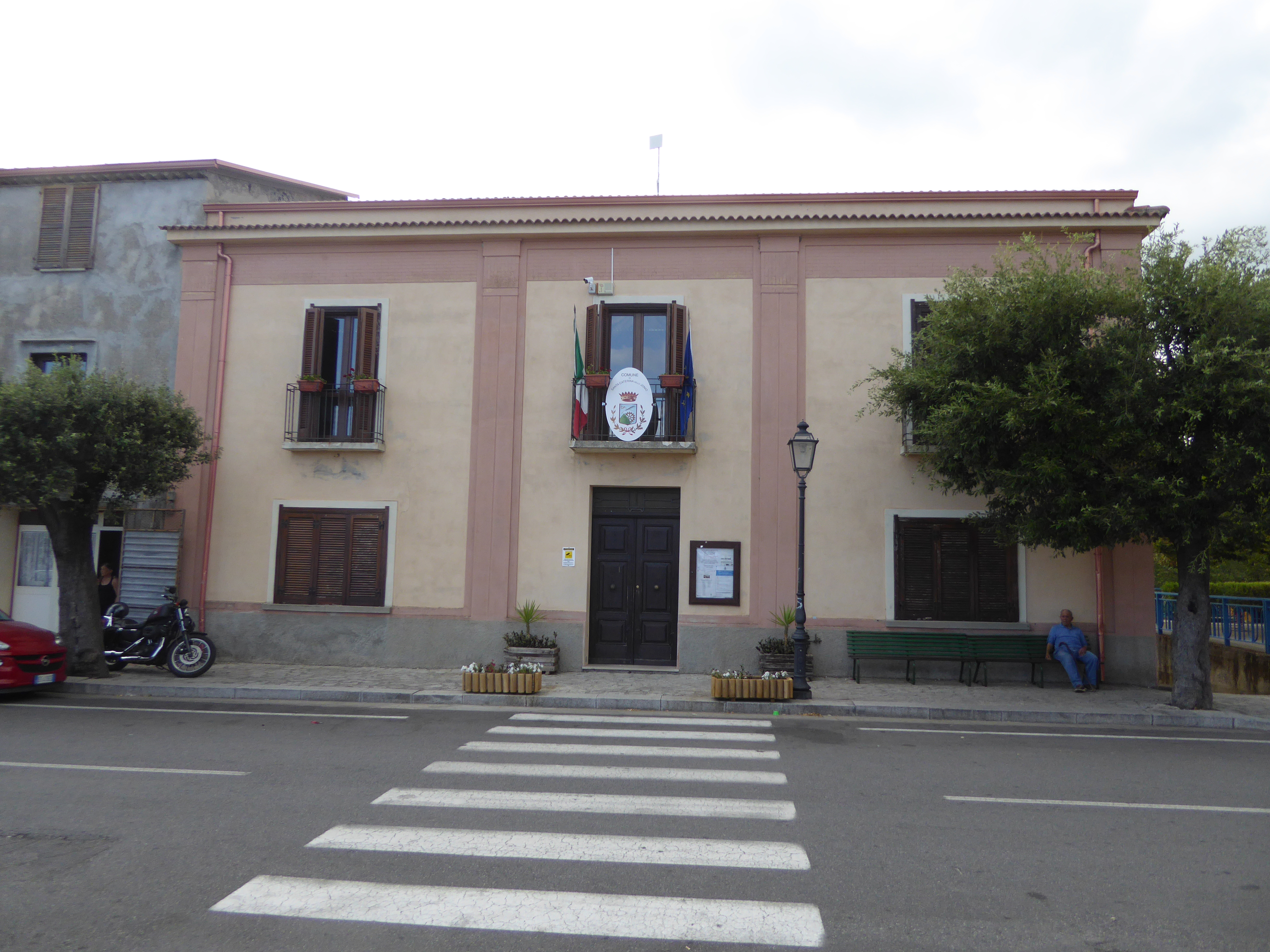 Comune di Santa Caterina dello Ionio